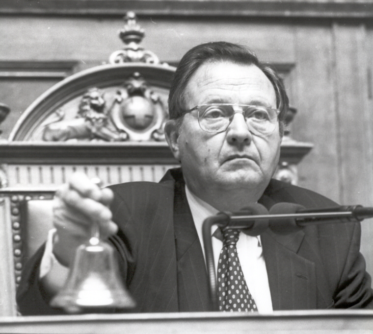 Riccardo Jagmetti, Schweizer Politiker. 1993/94 Ständeratspräsident